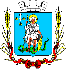 проект Кене герба Світловодська: Щит увінчаний срібною міською короною з трьома вежками та обрамований двома золотими колосками, оповитими Олександрівською стрічкою.